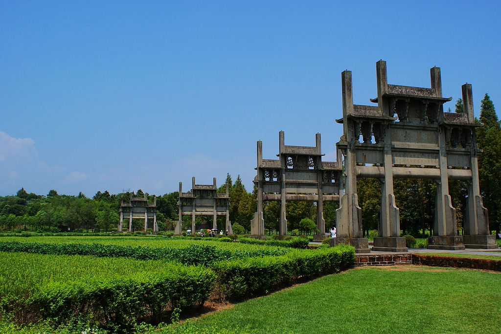 中文（中国大陆）: 安徽棠樾風光